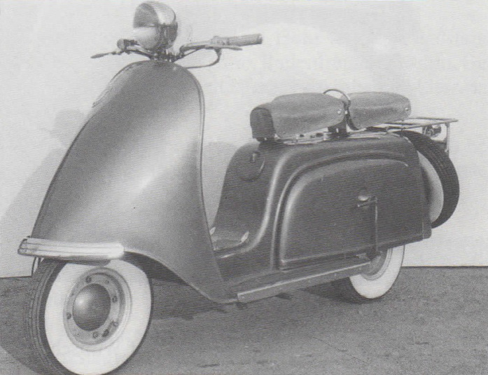 Der Lohner-Motorroller L125. Weitere Informationen